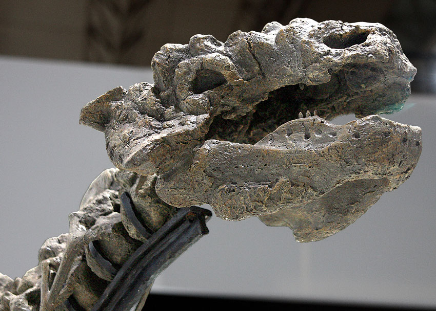 Tianzhenosaurus - 02